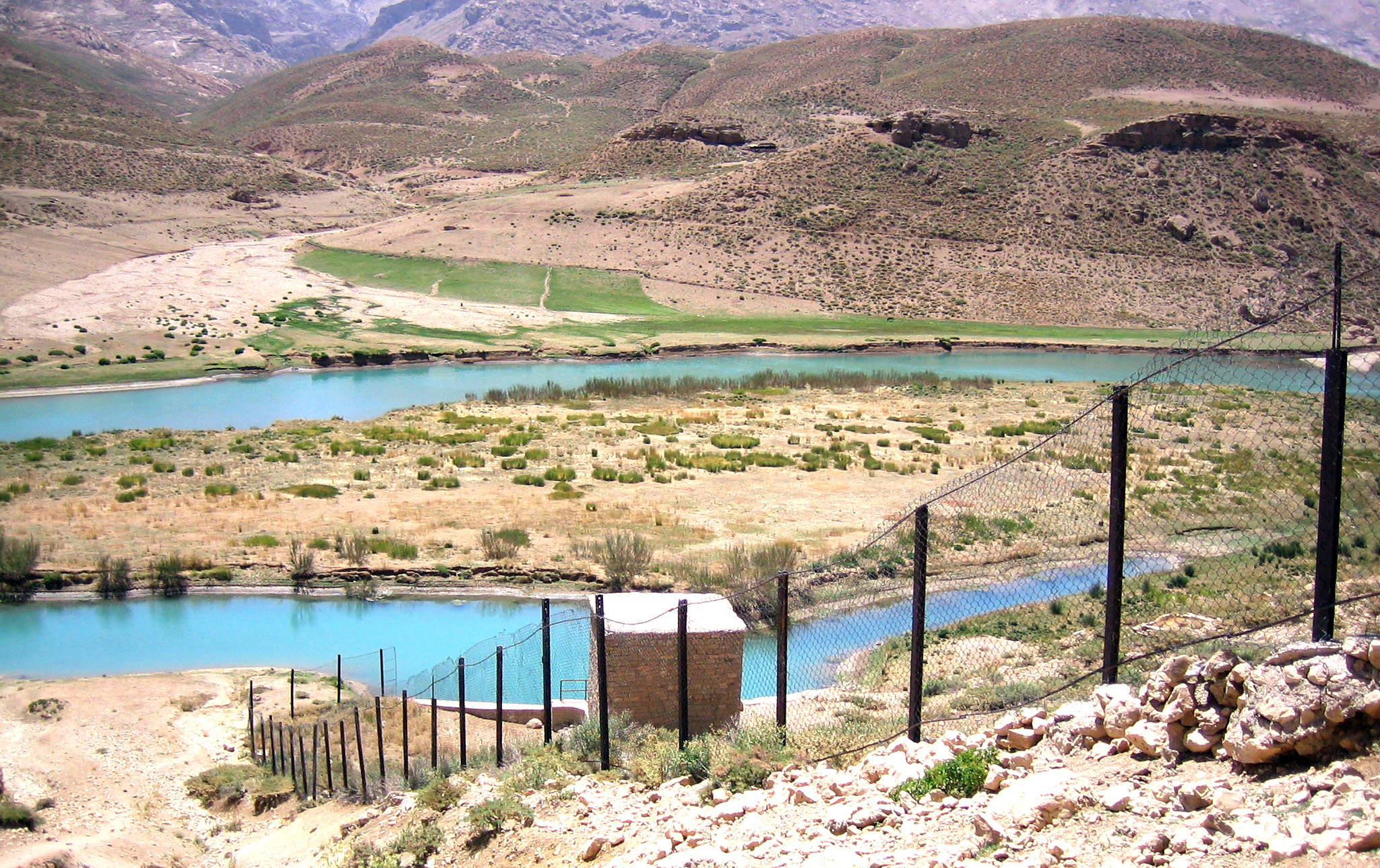 ورودي آب تونل كوهرنگ